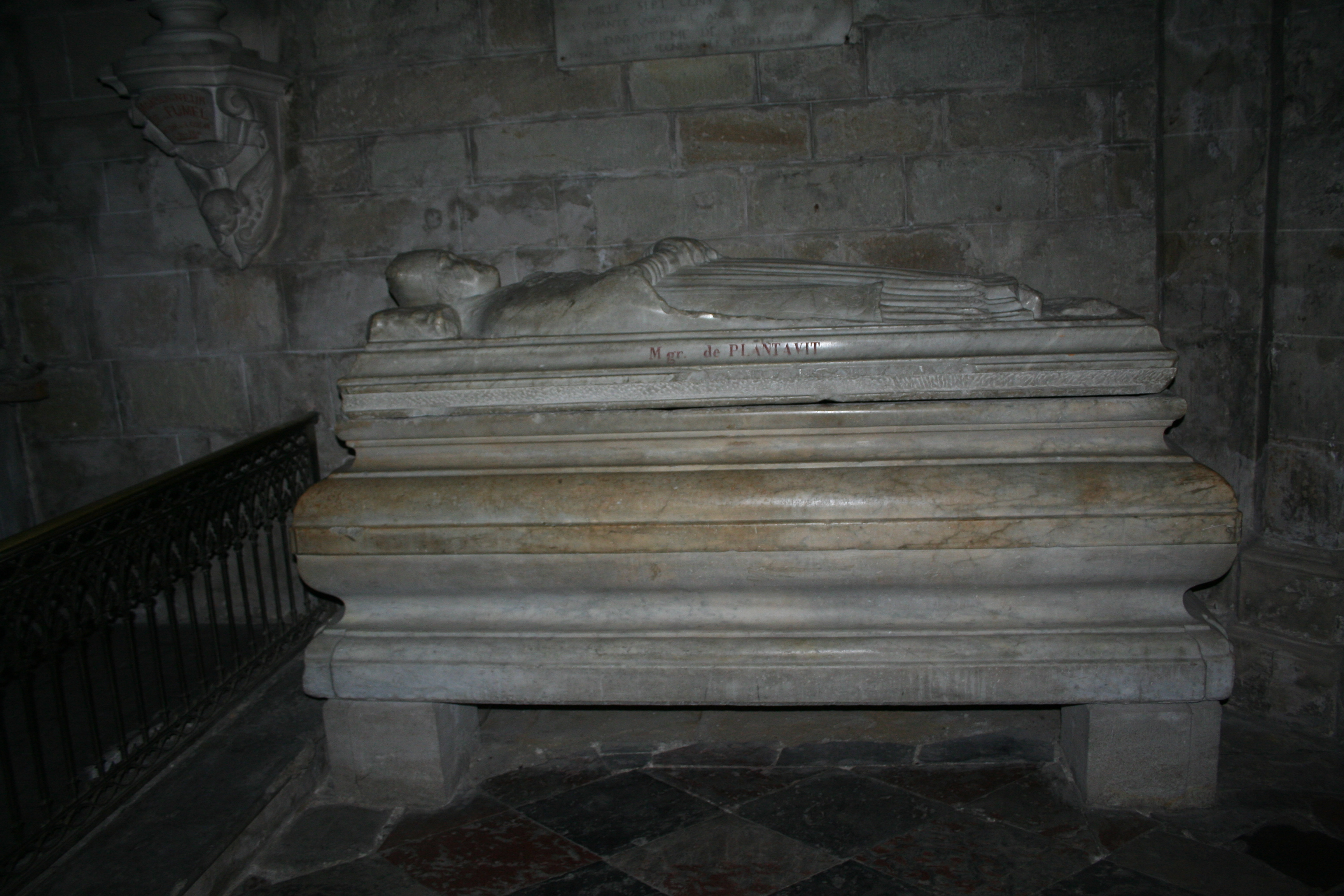 Lodève (Hérault) - cathédrale Saint-Fulcran, tombeau de Mgr de Plantavit, évêque.